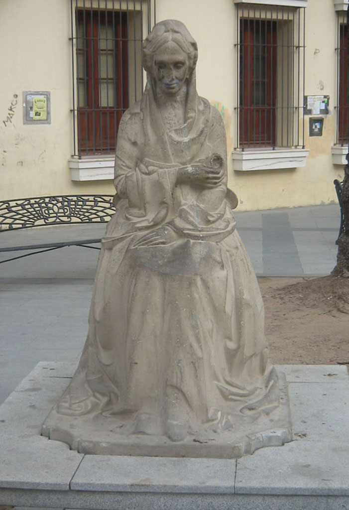 Estatua de la Infanta de España Mª Luisa Fernanda de Borbón